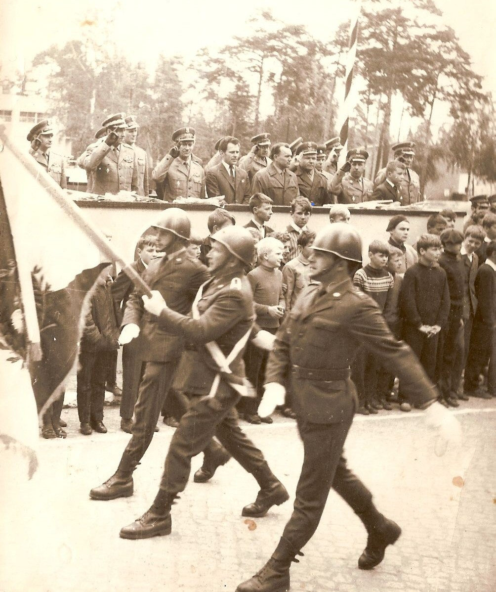 Poczet sztandarowy 27 pułku czołgów z Gubina